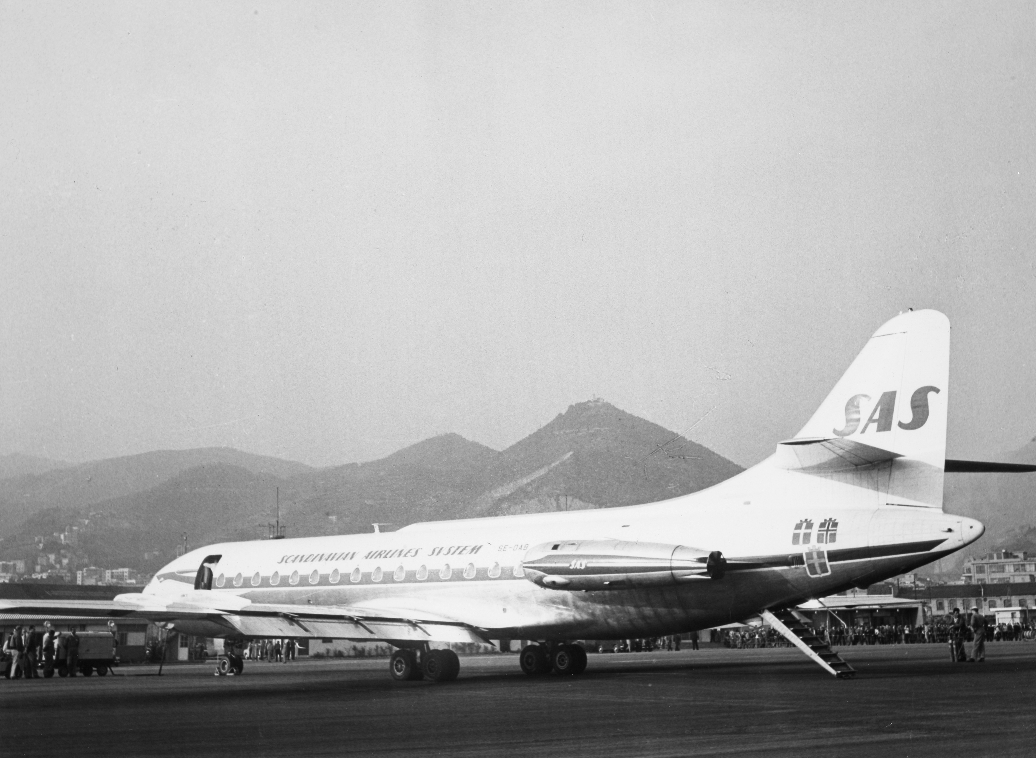 SAS Carvelle SE-210 Ingemar Viking SE-DAB, on the ground 1960s. Tropikuniformer, tropik uniformer ? Kolla unformer 1960tal Sydamerika Rio